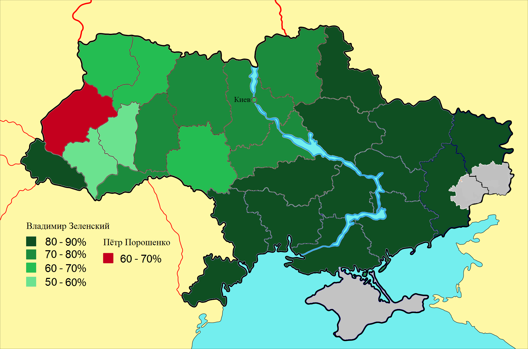 Карта результатов выборов на Украине 21 апреля 2019 года